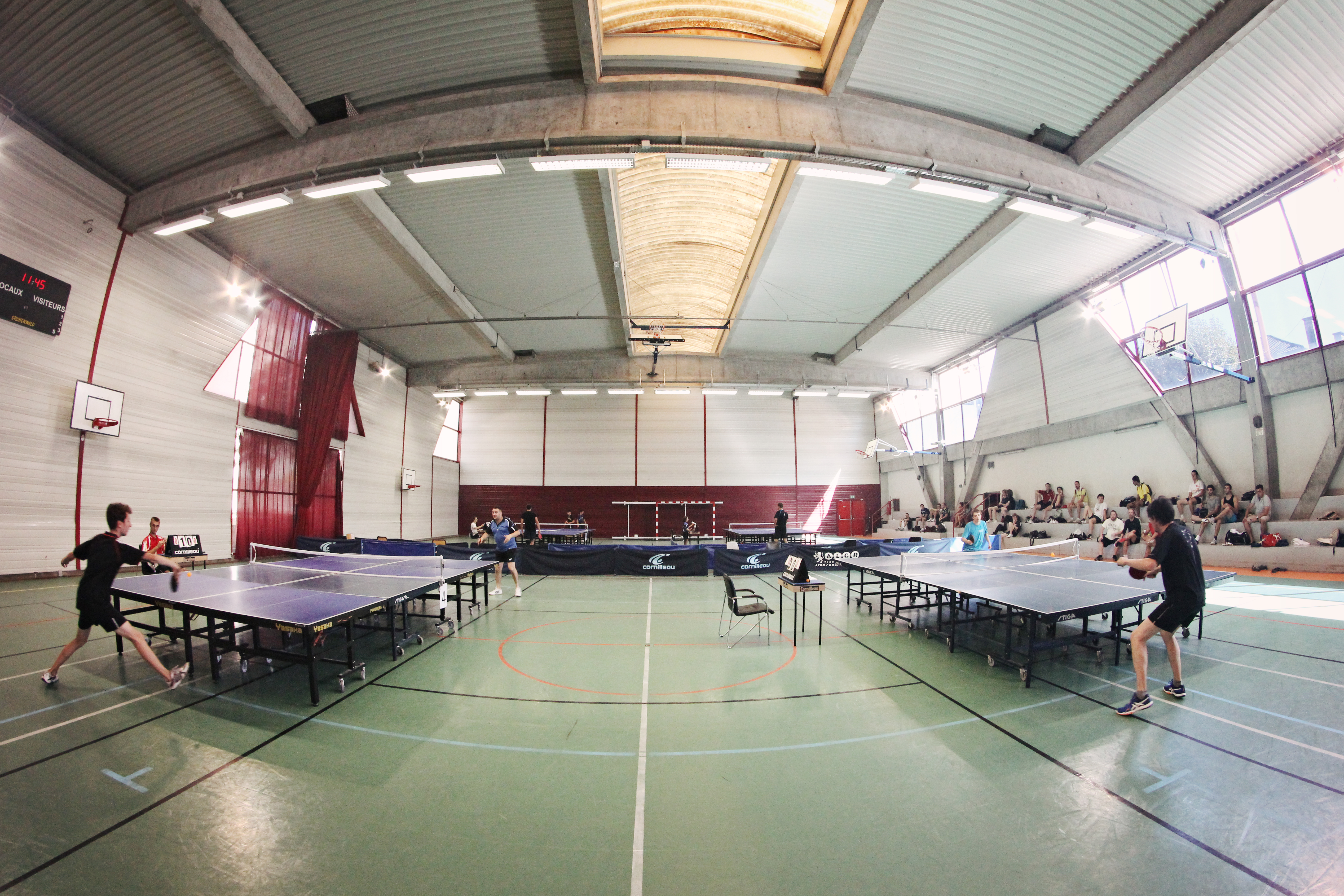 Tournoi d'Ultimate au sein de l'ALCR-TT